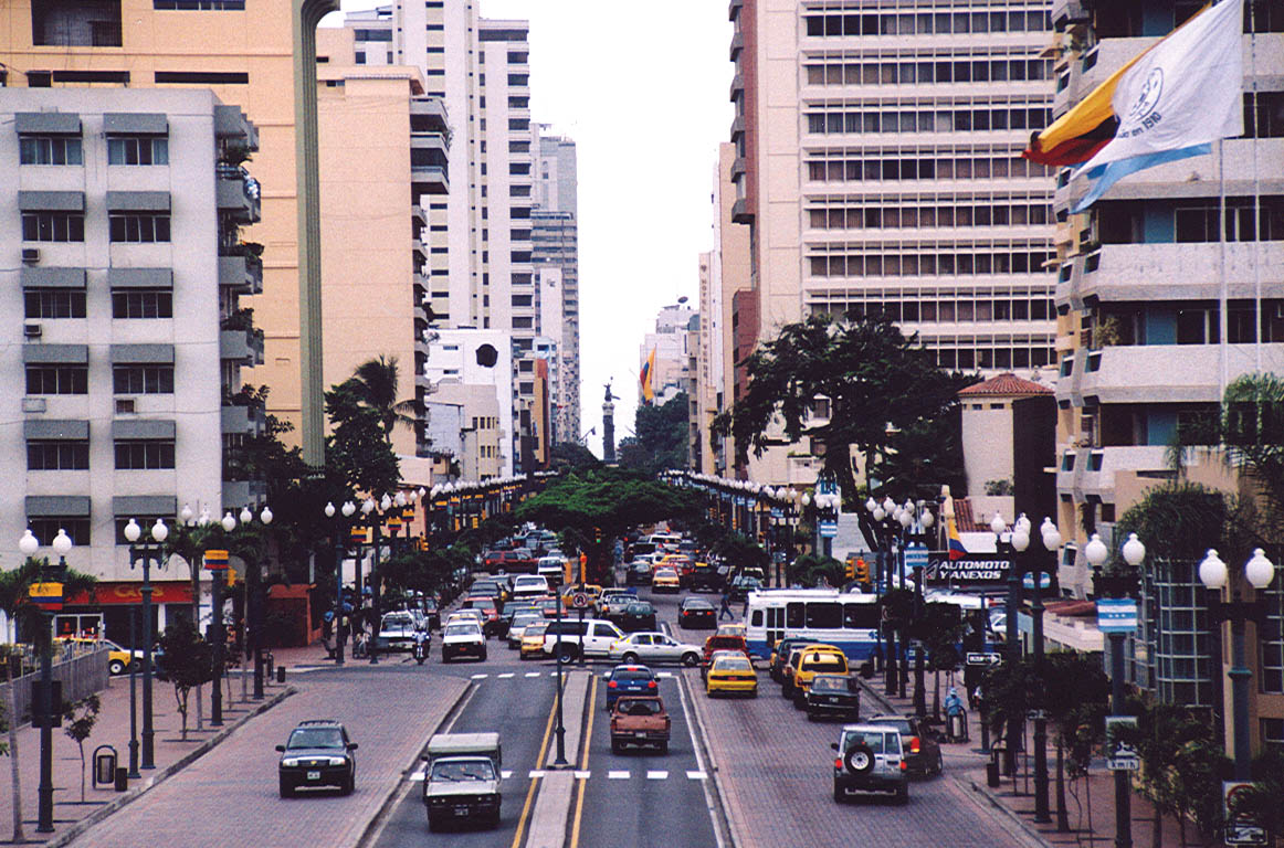 guayaquil